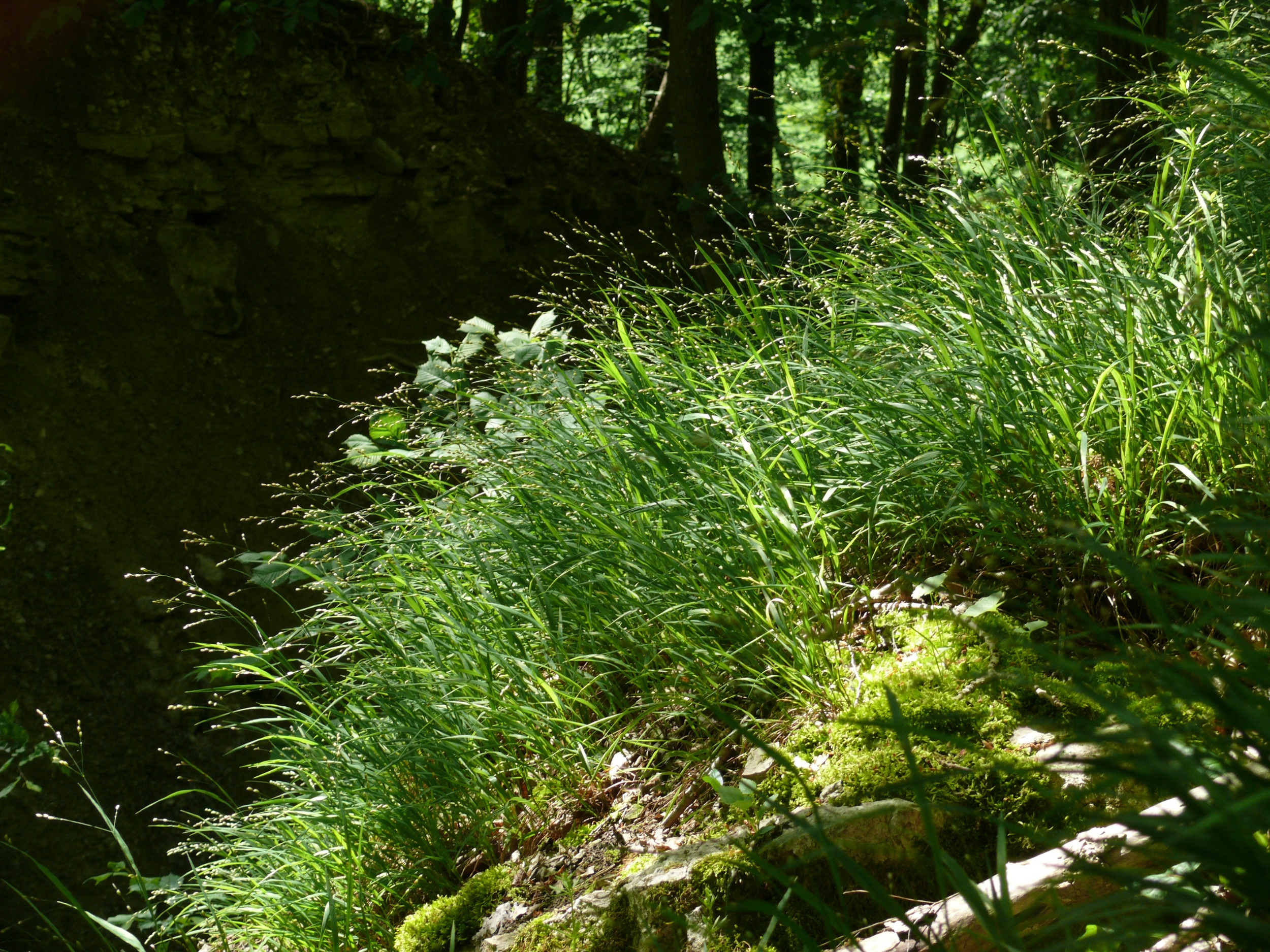 Melica uniflora,Hohenlohe